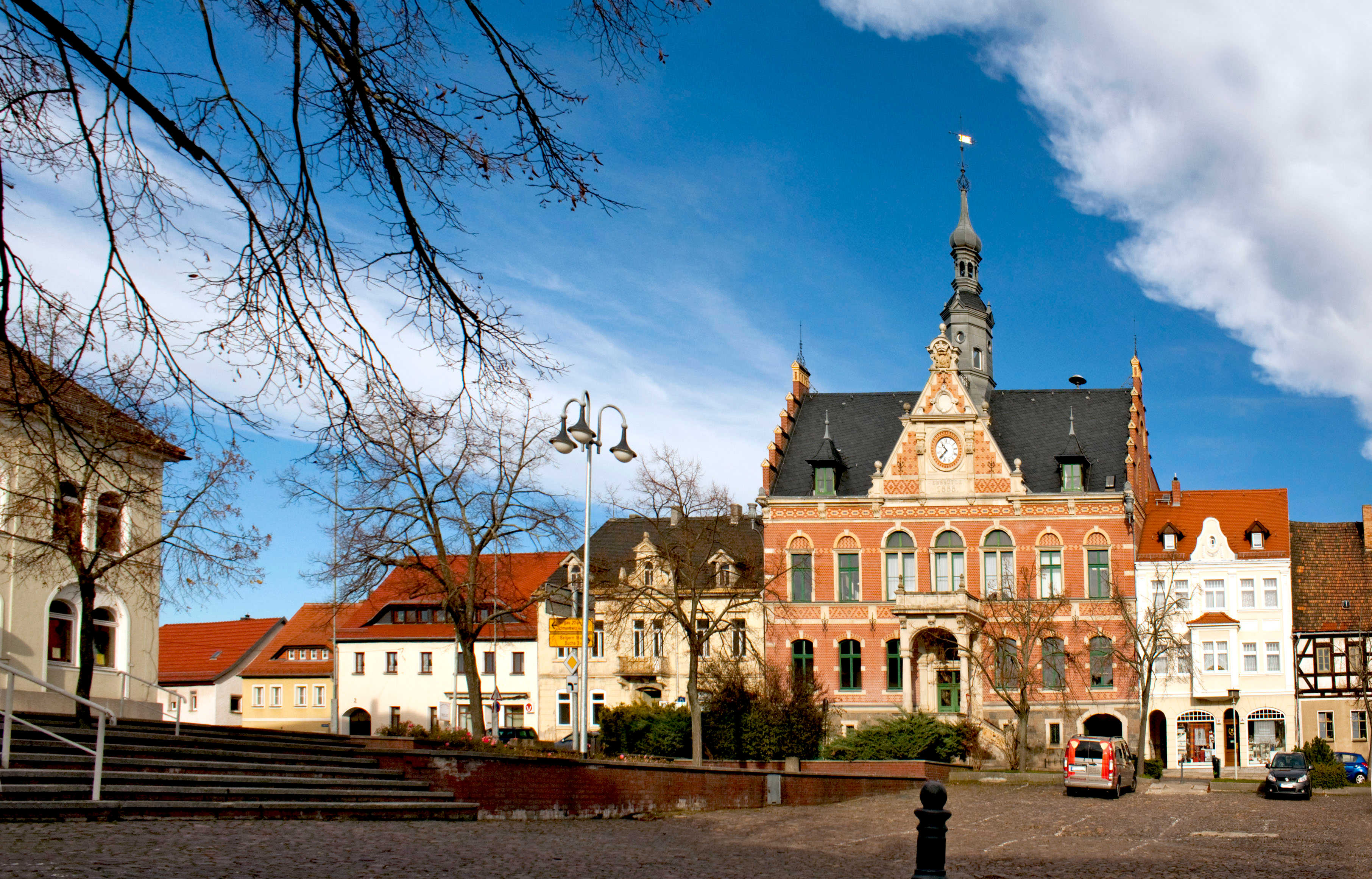 Rathaus Markt 4 in Dahlen